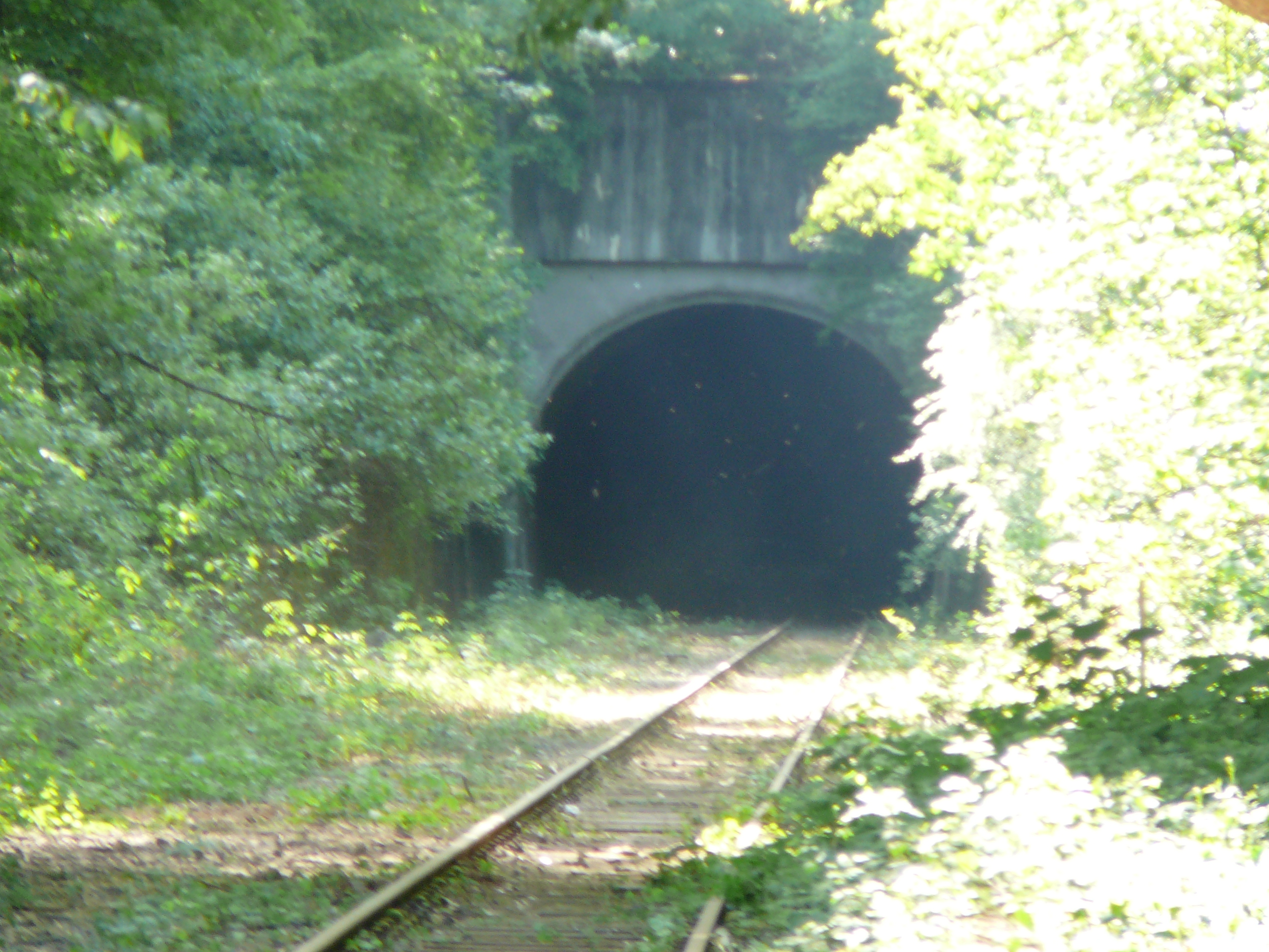 Historischer Bahnhof Wuppertal-Ottenbruch